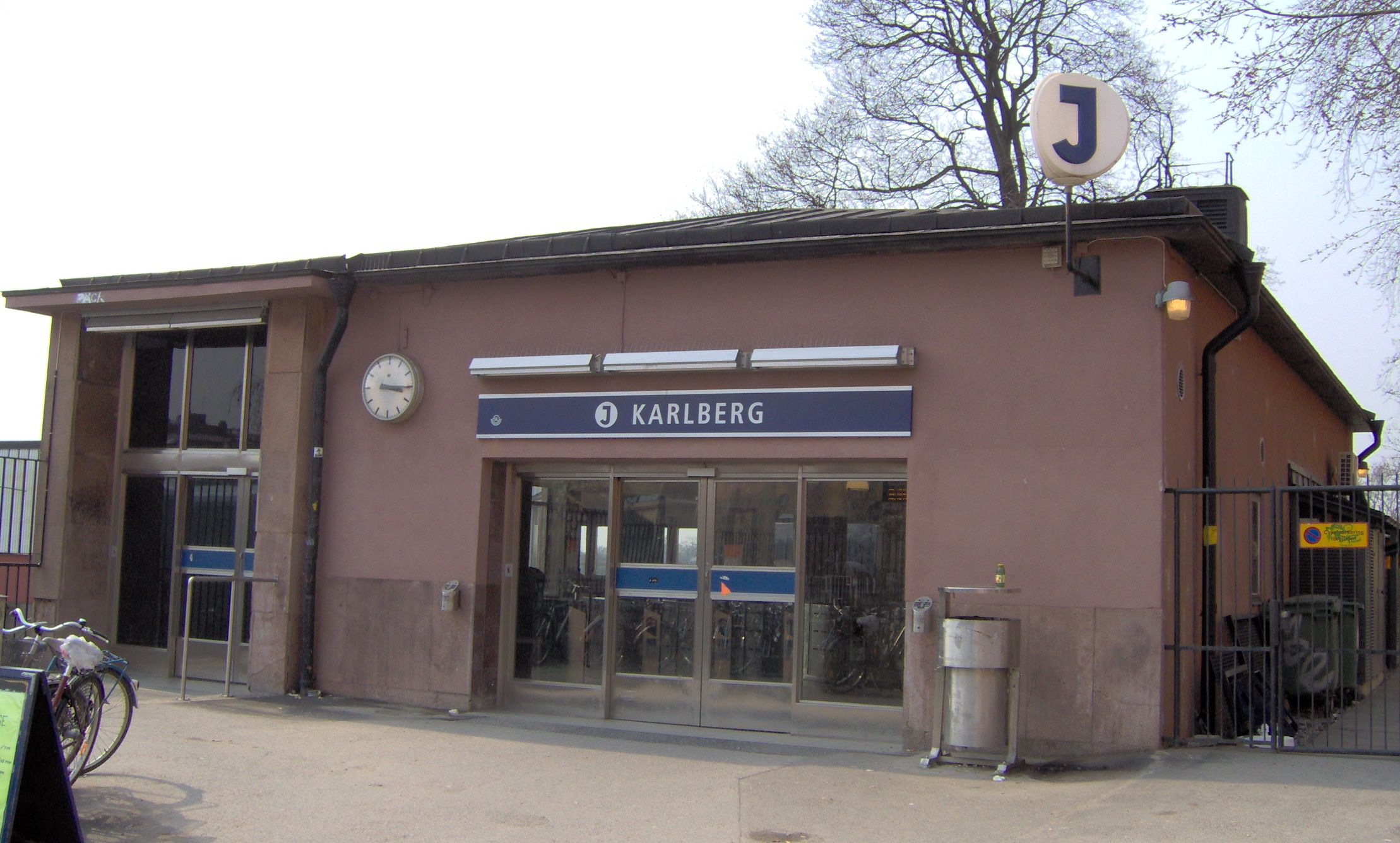 Karlbergs stationshus i Stockholm Karlbergs commutertrain stationhouse in Stockholm